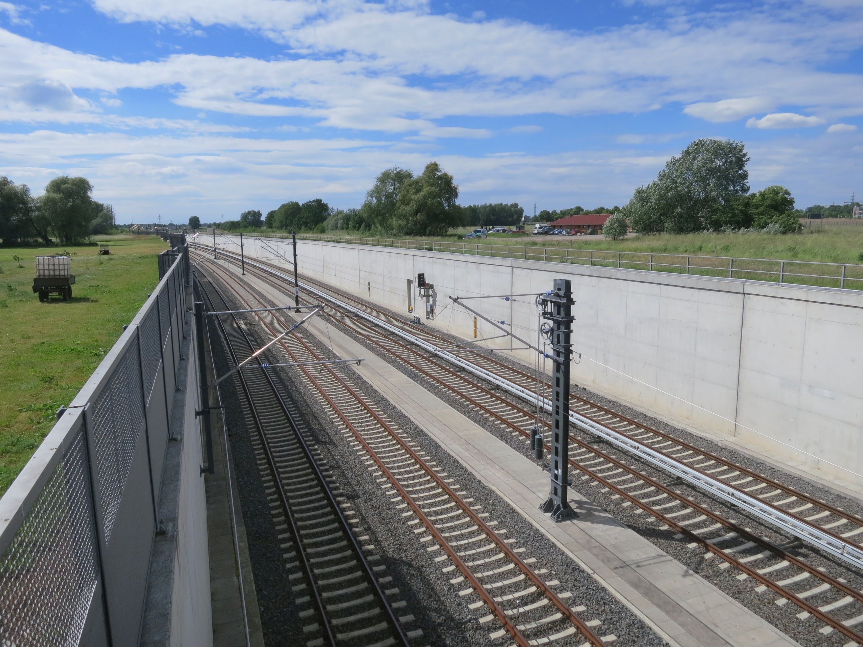 Selchow, Bahnstrecken zum BER, Trog, Blick nach Westen rechts die S-Bahn, rechts die Fernbahnstrecke